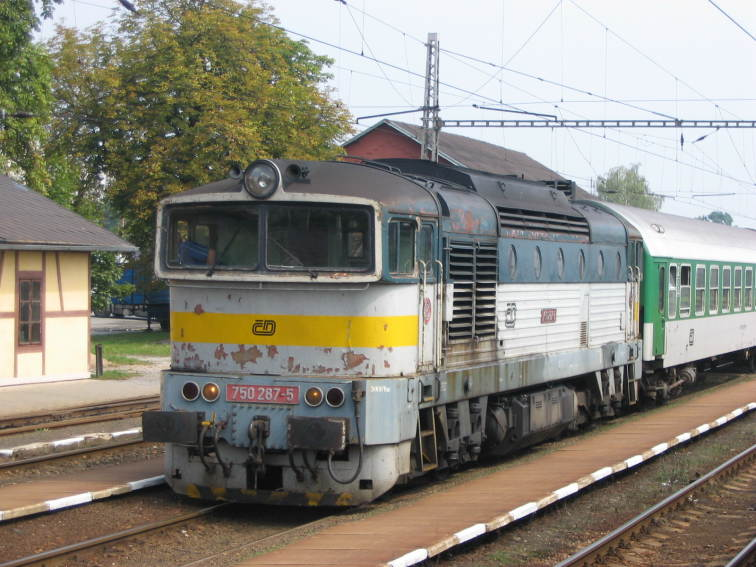 Lokomotiva řady 750, stanice Jaroměř